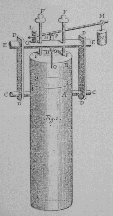 Ce dessin montre le principe du digesteur. Le couvercle d'un cylindre est maintenu en pression sur le corps du cylindre grace à deux vis. On introduit un peu d'eau à l'intérieur du cylindre, on visse le couvercle, puis on place le tout sur le feu. Lorsque l'eau se change en vapeur, la pression et la température de vapeur montent. A partir d'une certaine pression, la soupape de sûreté se soulève pour laisser sortir l'excès de vapeur : une pression et une température constante sont maintenues, jusqu'à ce que l'on retire l'appareil du feu.